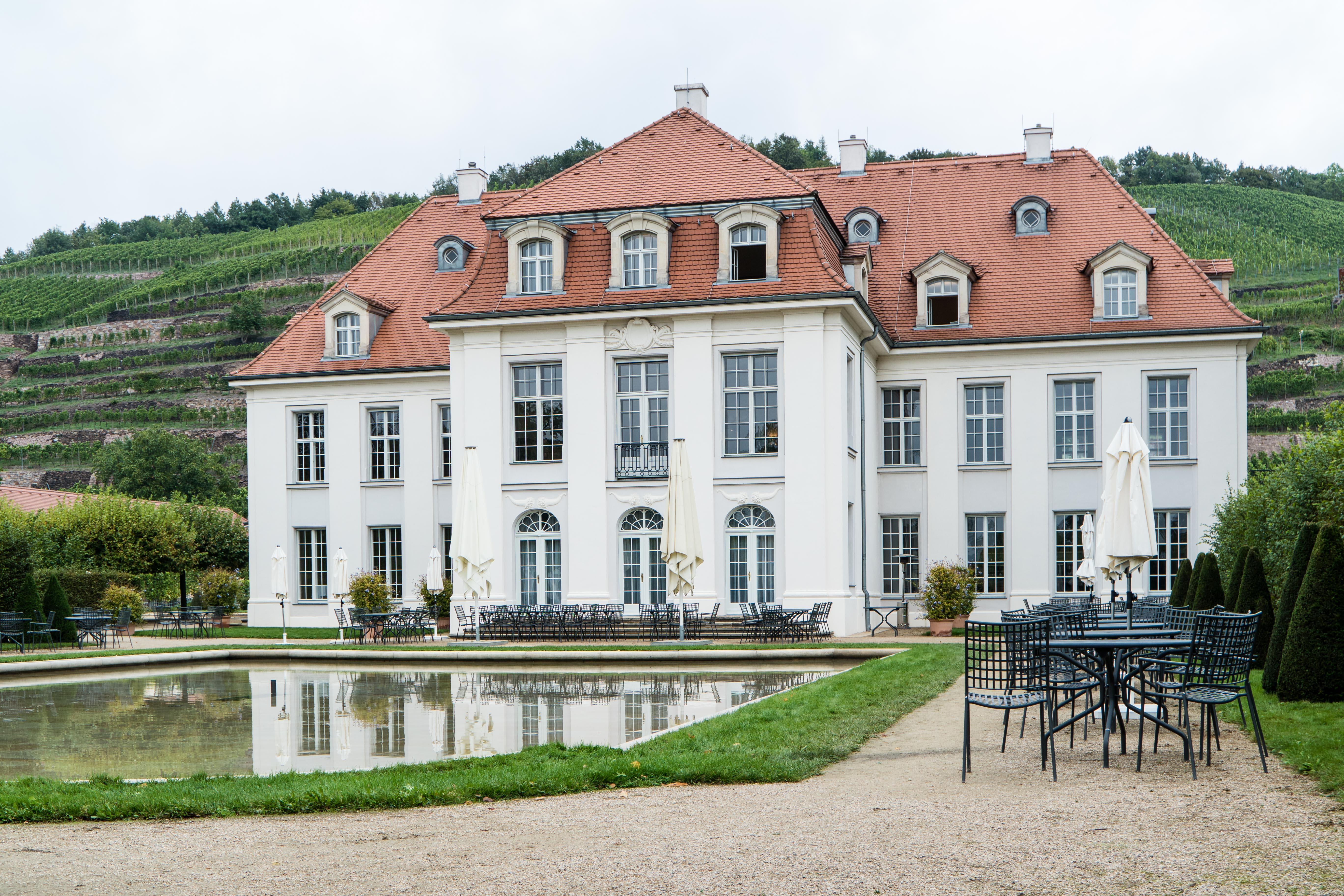 Schloss Wackerbarth in Radebeul